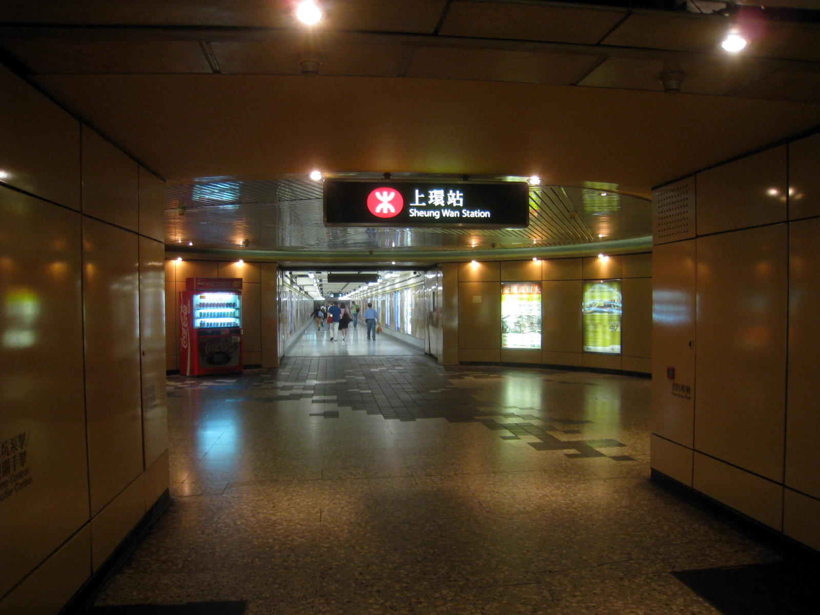 MTR Sheung Wan Station Exit D 上環站D出口